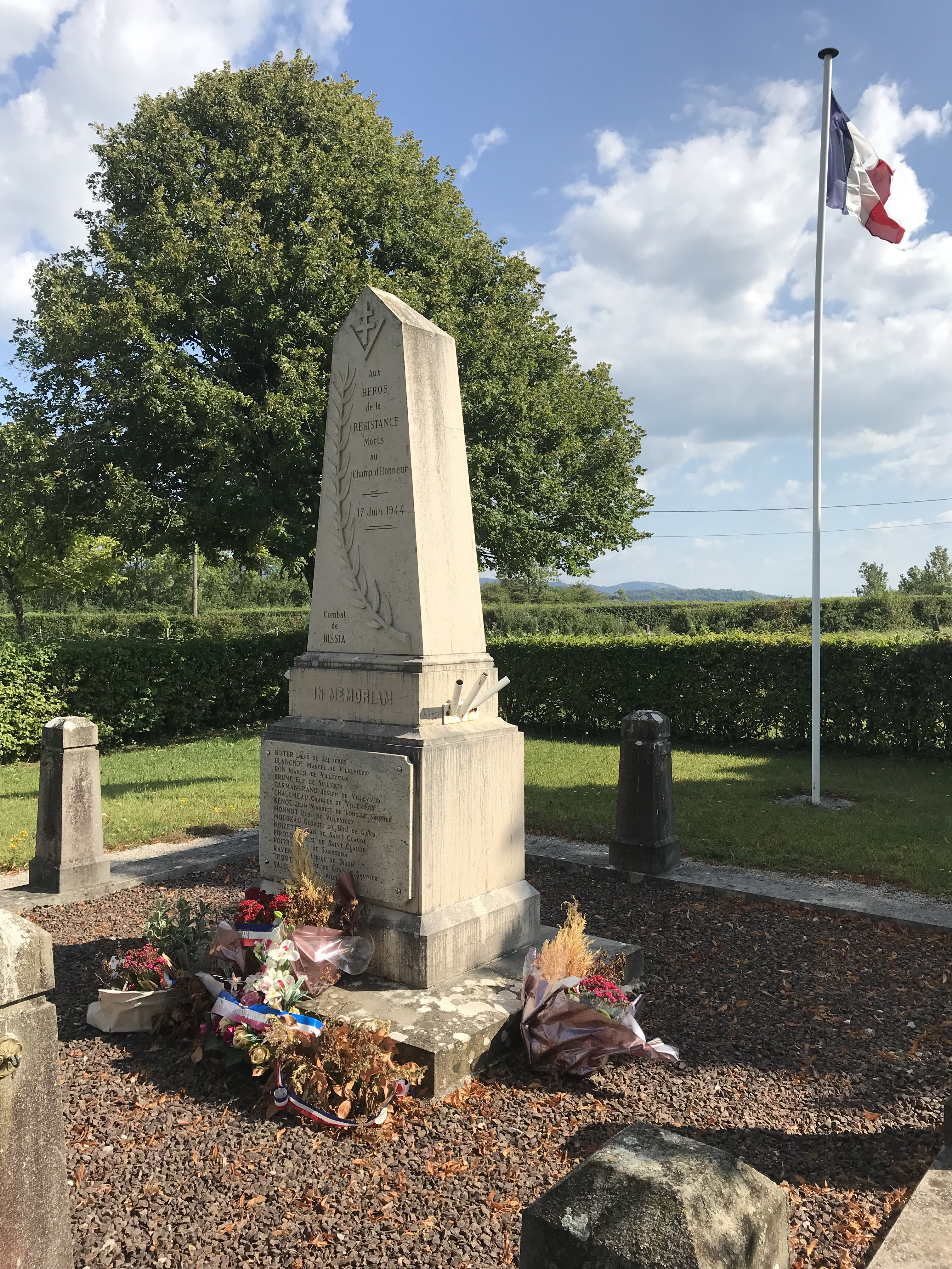 Mémorial du 17 juin 1944 à Bissia (Boissia, Jura, France).